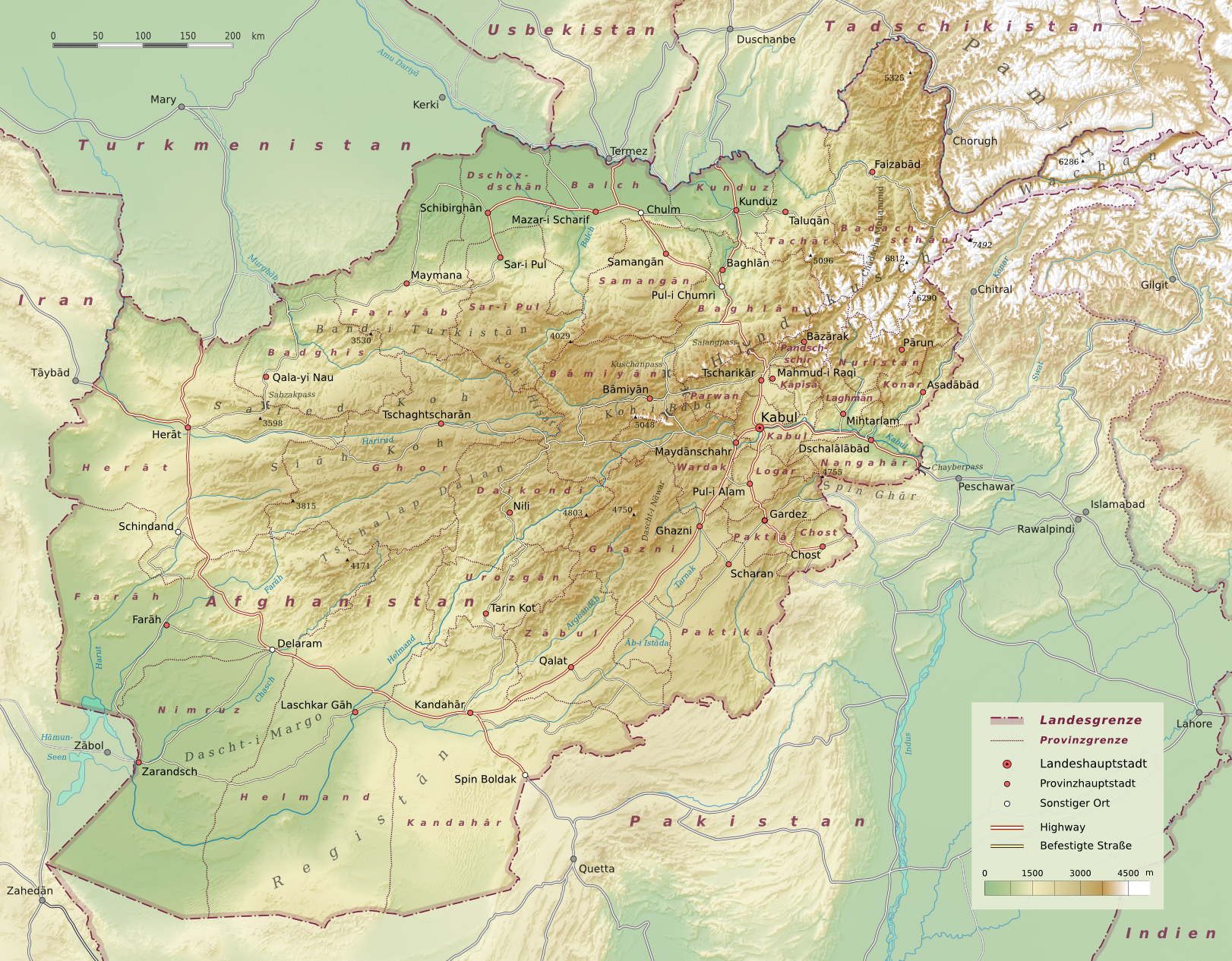 Physische Karte Afghanistan, administrative Gliederung in 34 Provinzen gemäß der Verwaltungsreform von 2005.